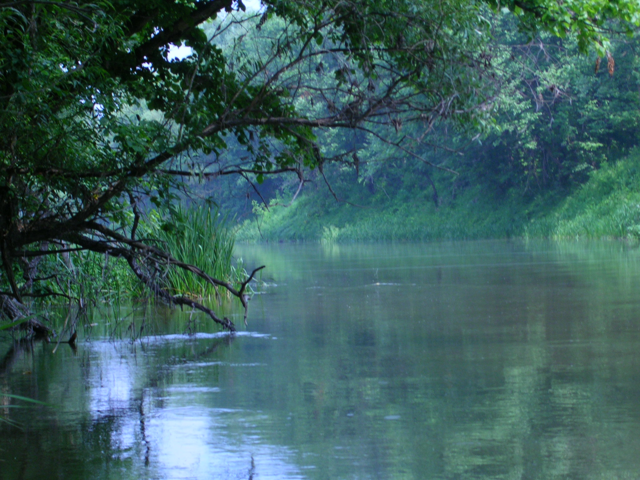 Деркульський, Станично-Луганський район